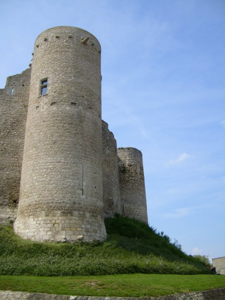 Château de Billy dans l'Allier (Auvergne, France).